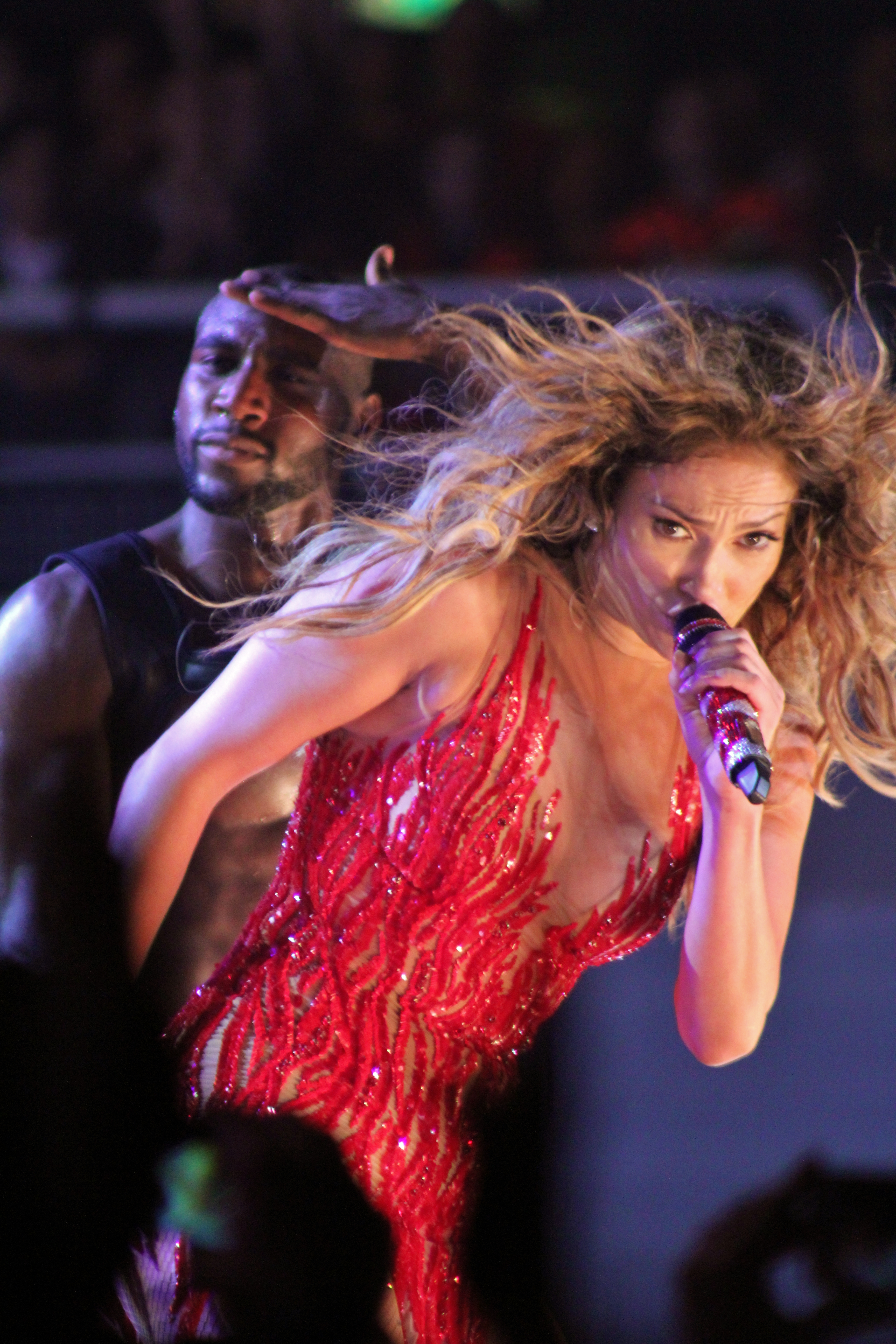 ITALY - AUTUMN 2012